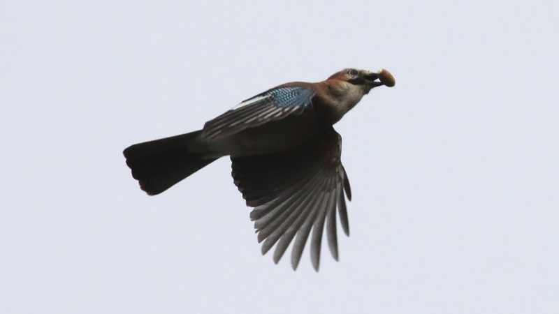 Jay (Garrulus glandarius)